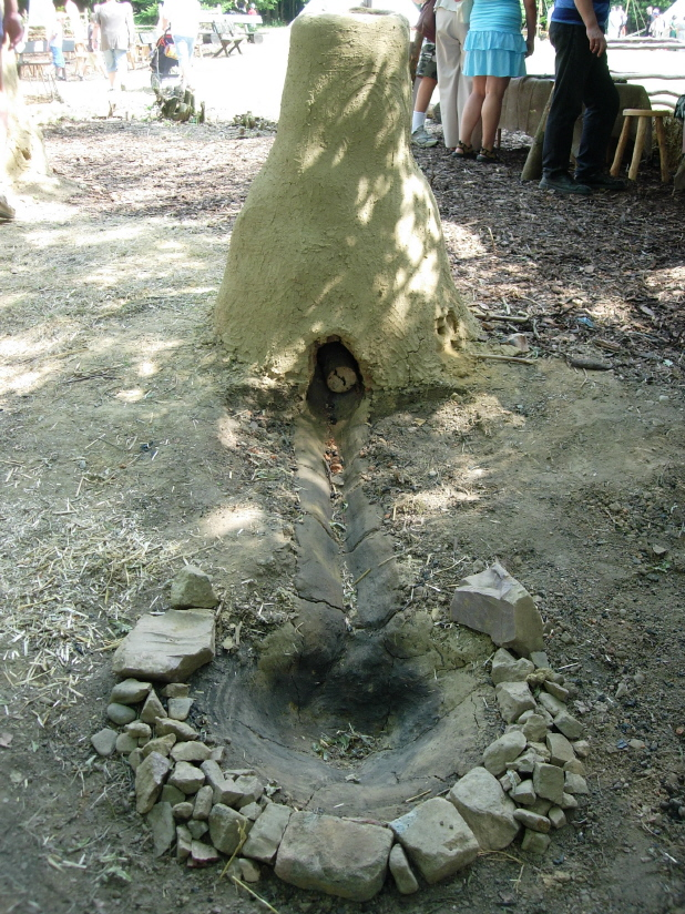 Beschreibung: Nachbau eines Keltischen Rennofen zur Eisengewinnung; Ausstellung auf dem Internationalen Keltenfest "CELTOI 2006" in Nonnweiler-Otzenhausen (Deutschland). Autor: EwigLernender Quelle: eigenes Foto Erlaubnis zur freien Verwendung